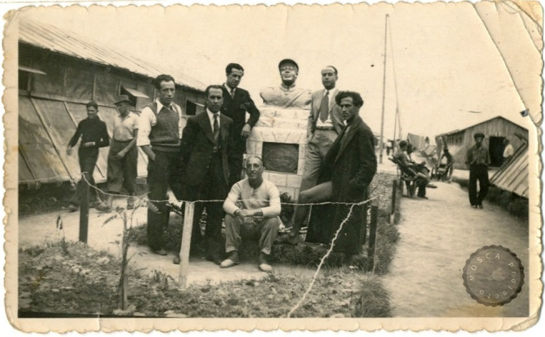 Militantes Confederação Geral do Trabalho presos em Peniche - Arquivo Histórico-Social - 1934-1935